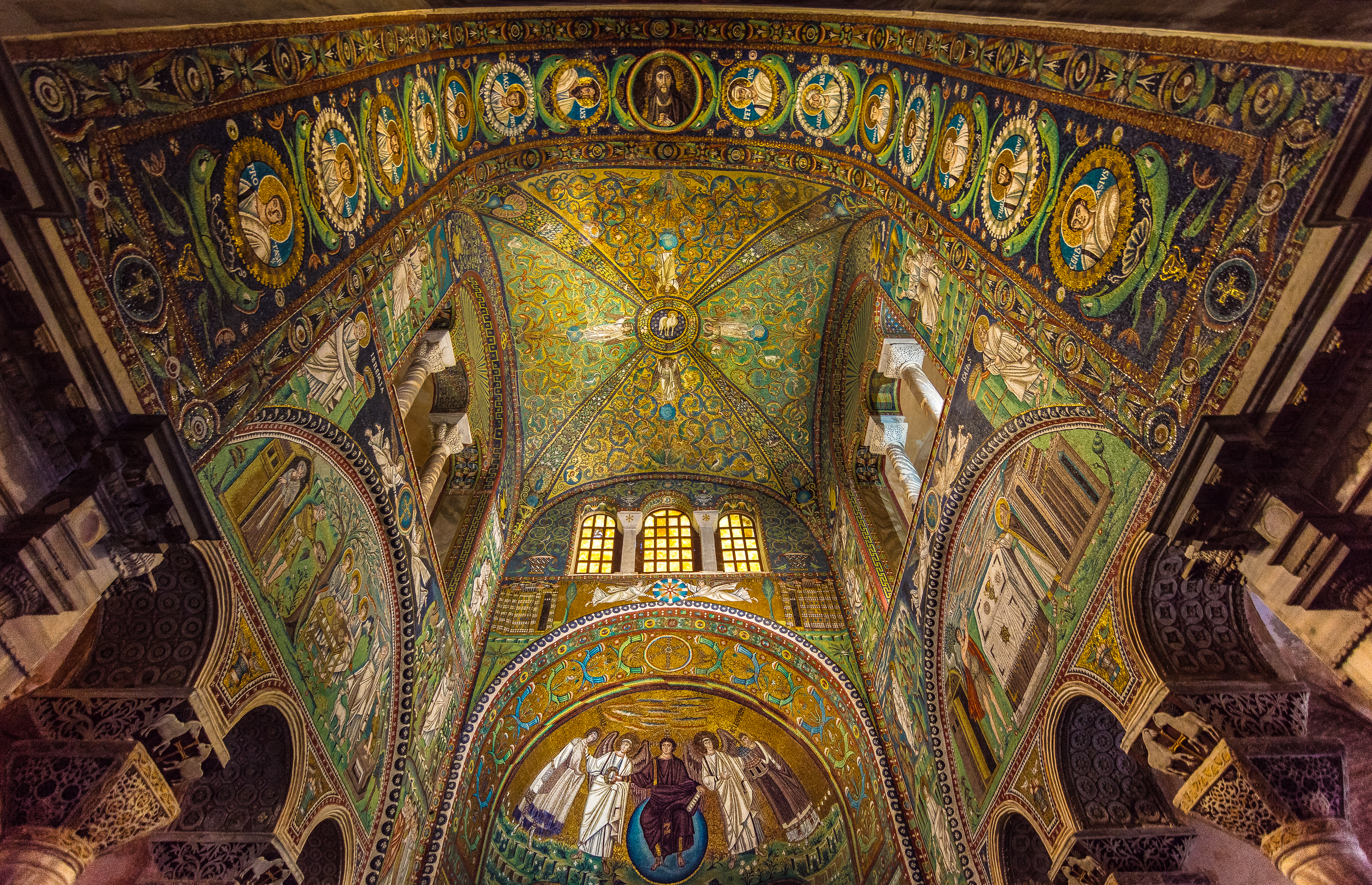 Basilica di San Vitale This is a photo of a monument which is part of cultural heritage of Italy.